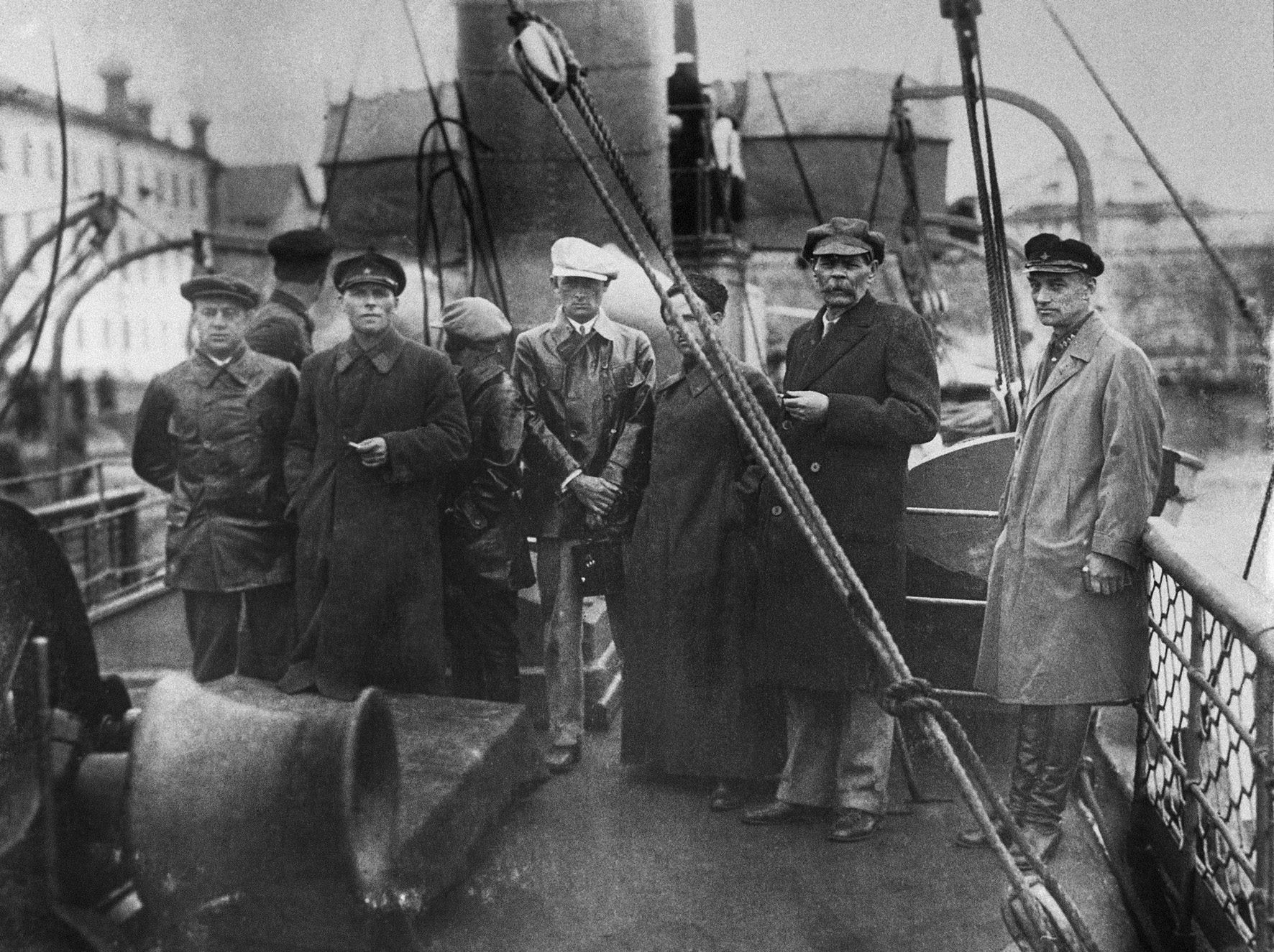 Визит писателя Максима Горького в Соловецкий лагерь 20-23 июня 1929 года. Изображенный на борту корабля "Глеб Бокий". Слева направо: неизвестный, сотрудник ОГПУ и Начальник лагеря Соловецкий Александр П. Ногтев, племянница Максима Горького Надежда А. Пешкова, Максим A. Пешкoв, сотрудник ОГПУ Матвей С. Погребинский, Максим Горький, Начальник Специального отдела ОГПУ РСФСР Глеб Бокий.